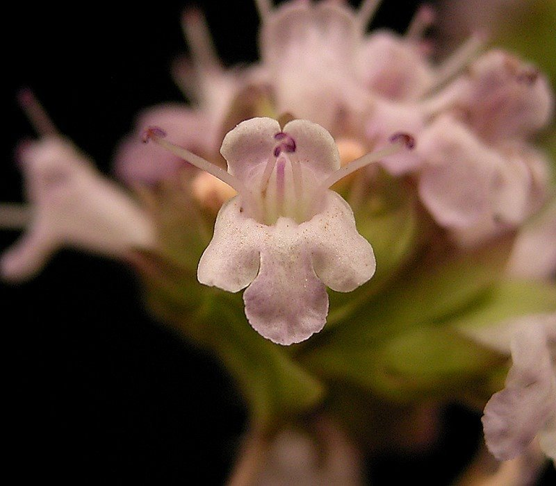 Origanum vulgare